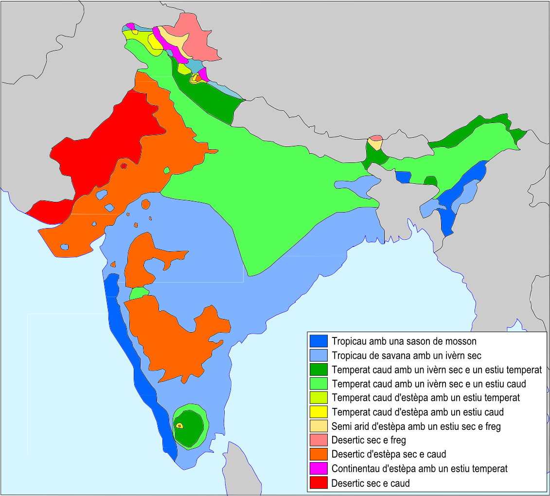 Clima d'Índia.